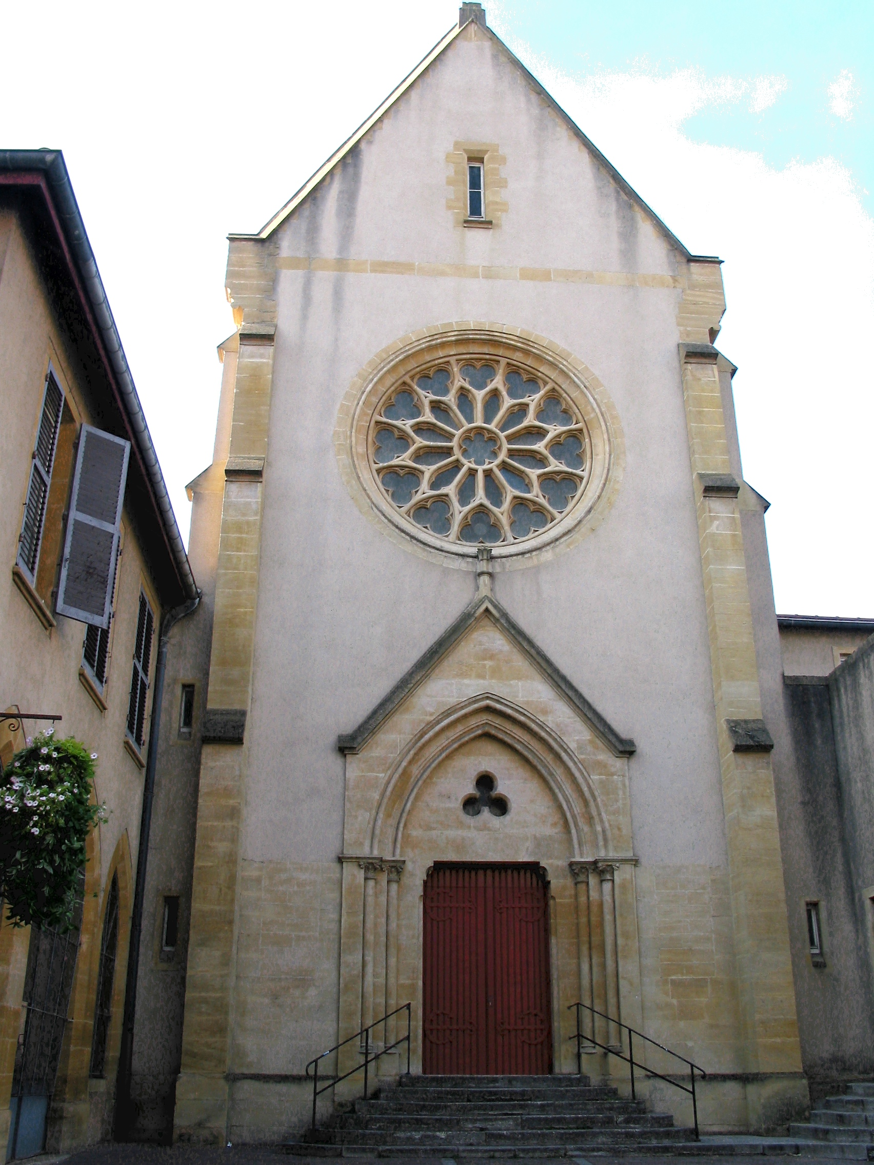 Chapelle des Trinitaires_ 10, rue des Trinitaires Metz .